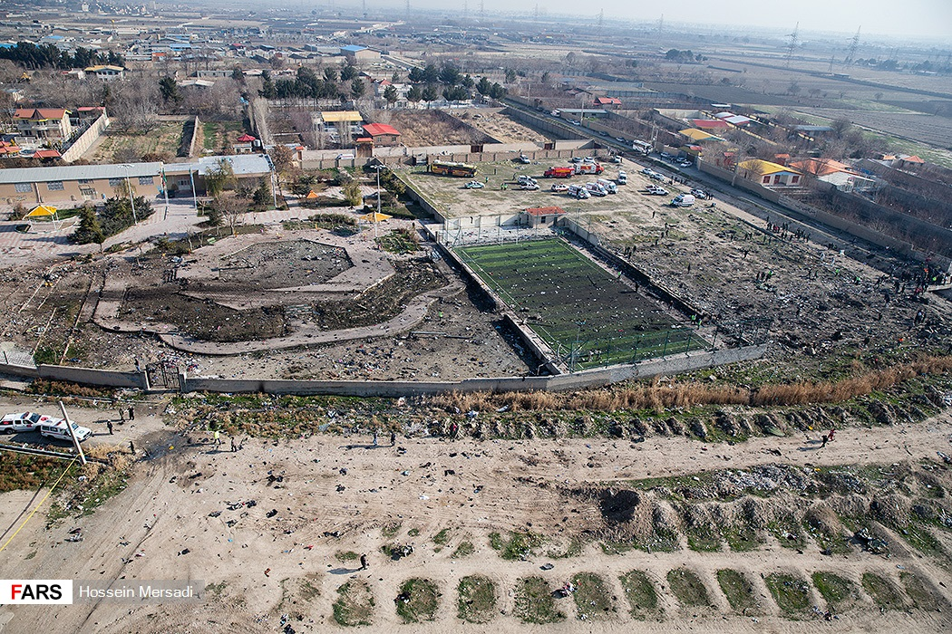 سقوط هواپیمای اوکراینی بوئینگ ۷۳۷–۸۰۰ بین شهرهای پرند و شهریار در استان تهران